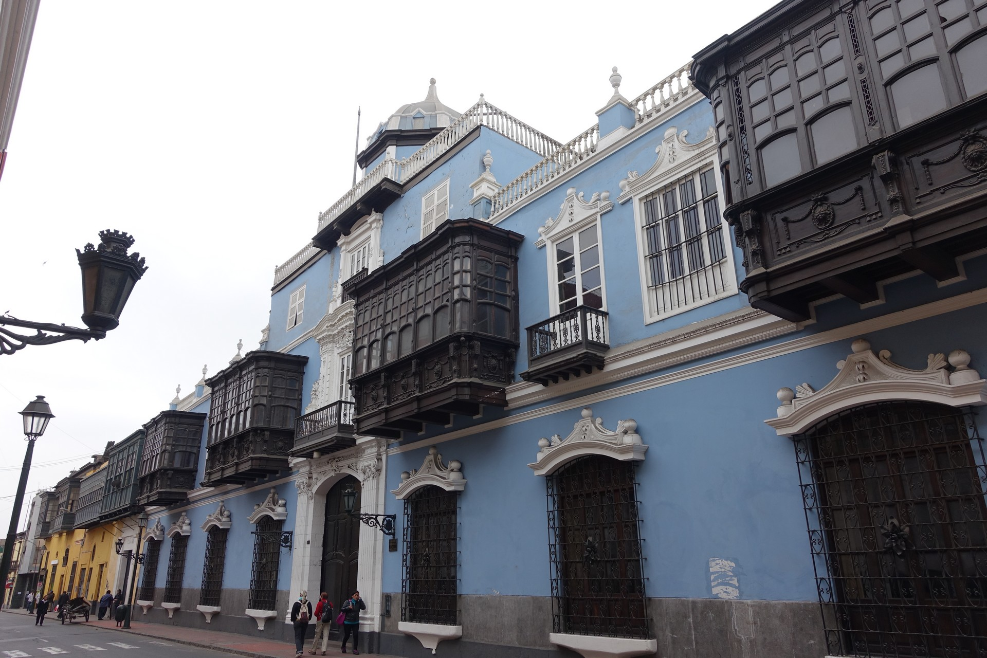 Lima (Pérou)